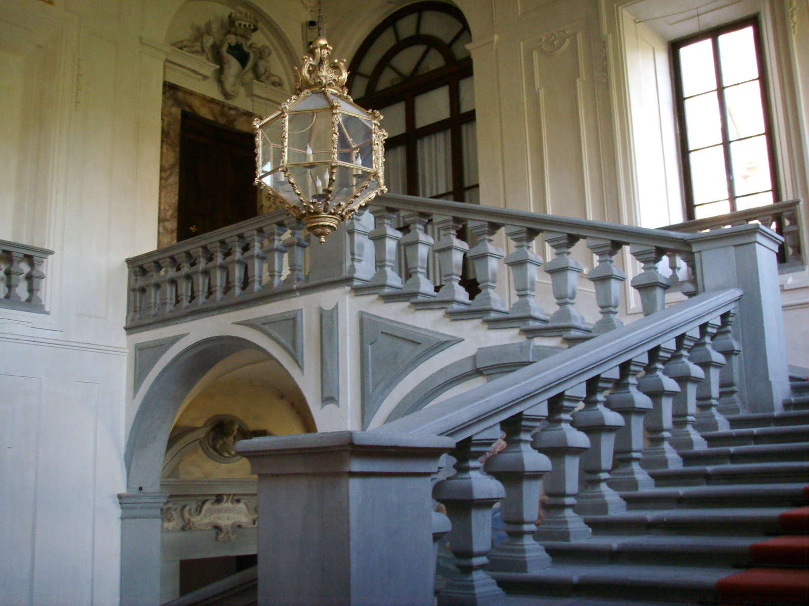 Palazzo_di_Gino_Capponi Monumental staircase in Florence